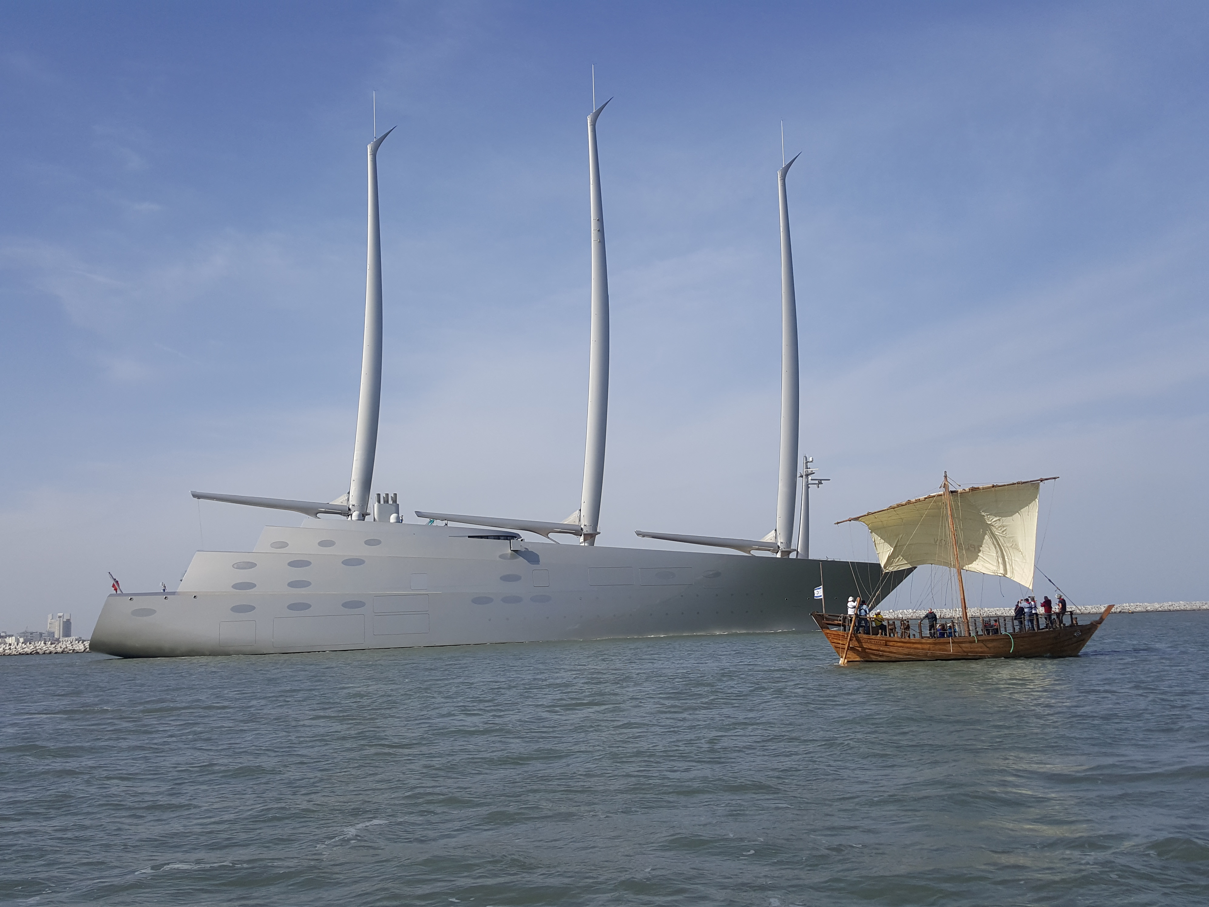 מפגש דורות 2 - הספינה בהפלגה על רקע היאכטה "A" המפרשית הגדולה בעולם